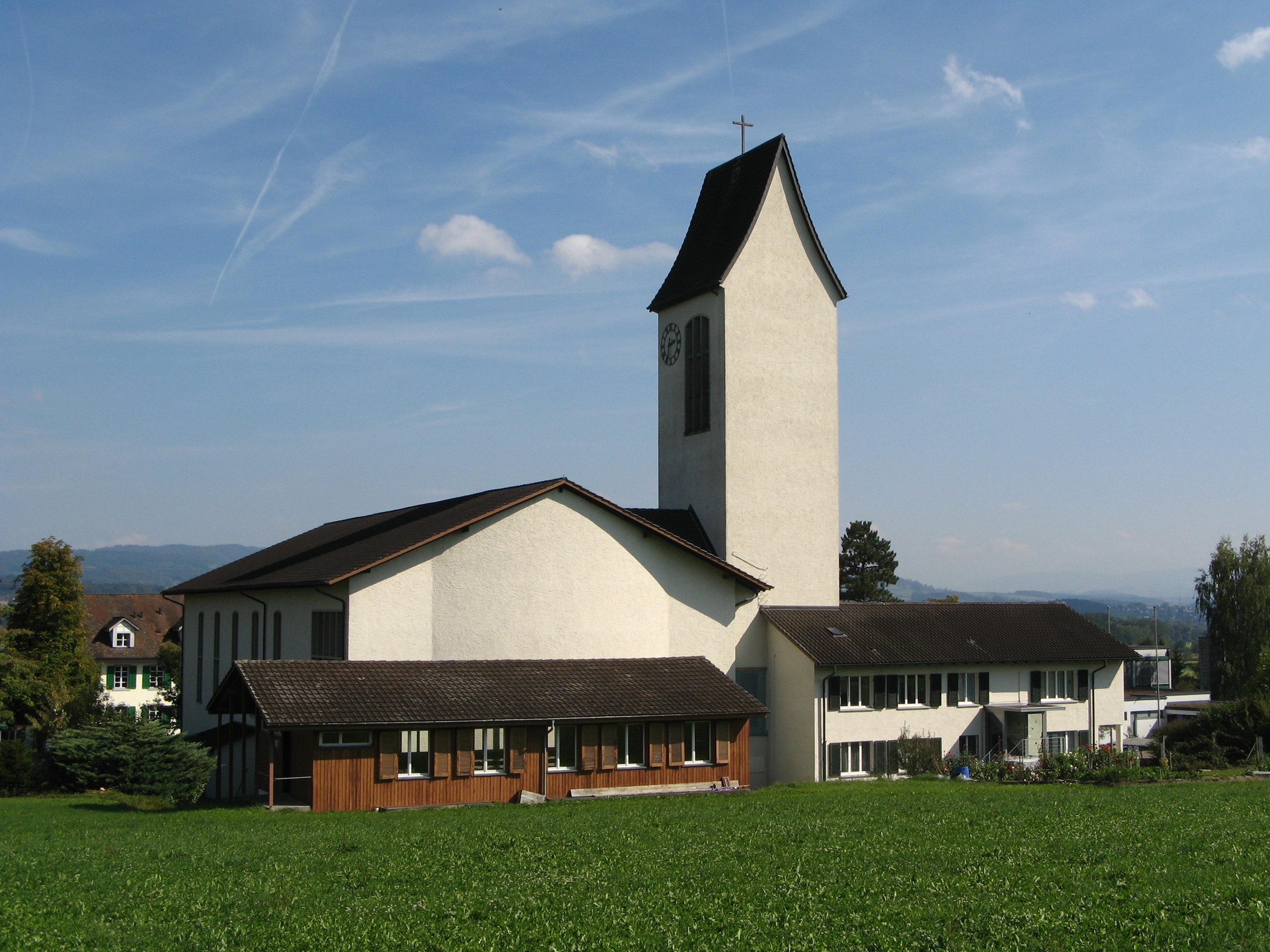 Aussenansicht der Pfarrkirche St. Wendelin in Aristau, ID 909